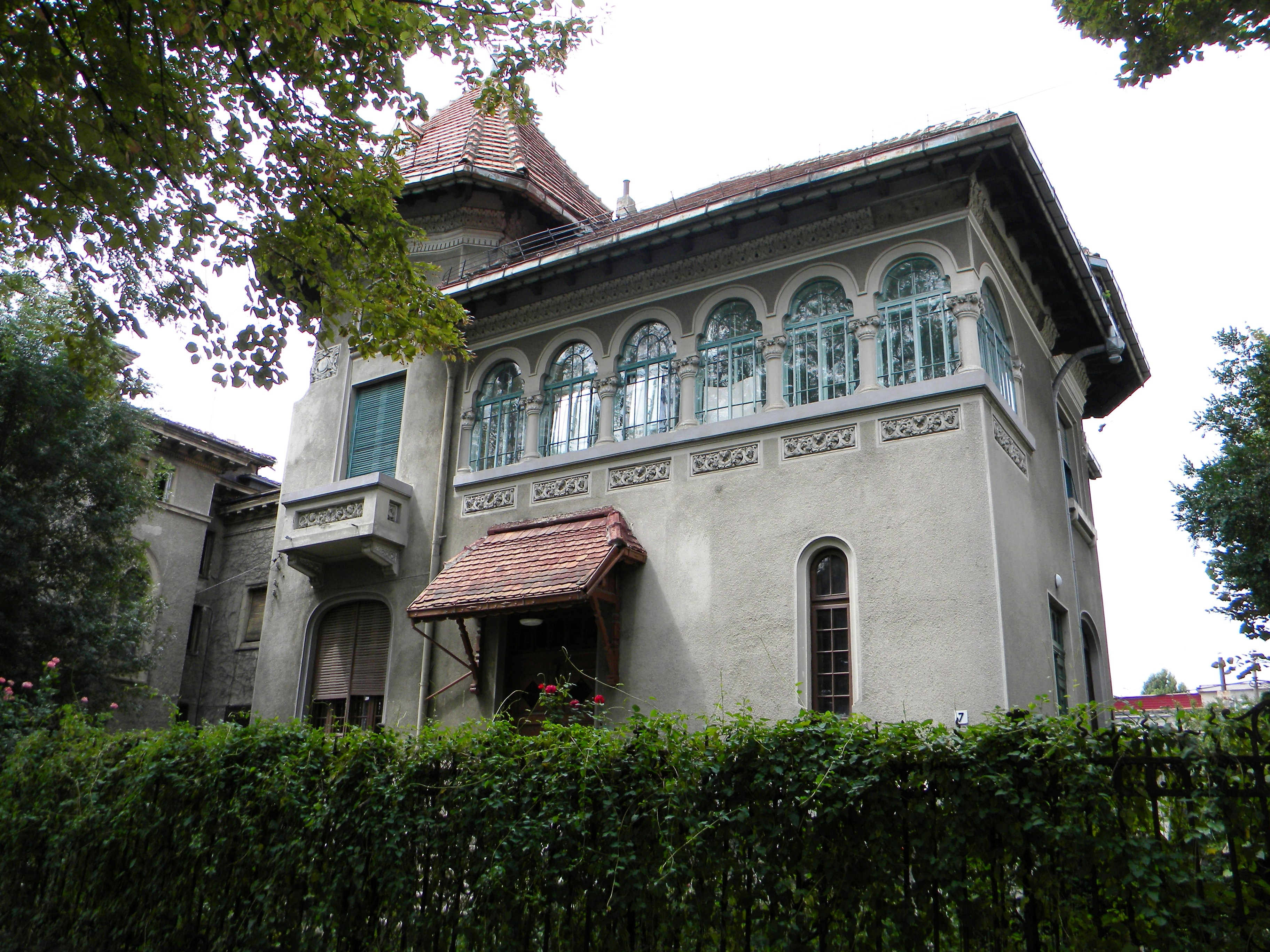 Imobil pe Bd. Aviatorilor, nr. 7, Bucuresti sect. 1.B-II-m-B-18031 (2)